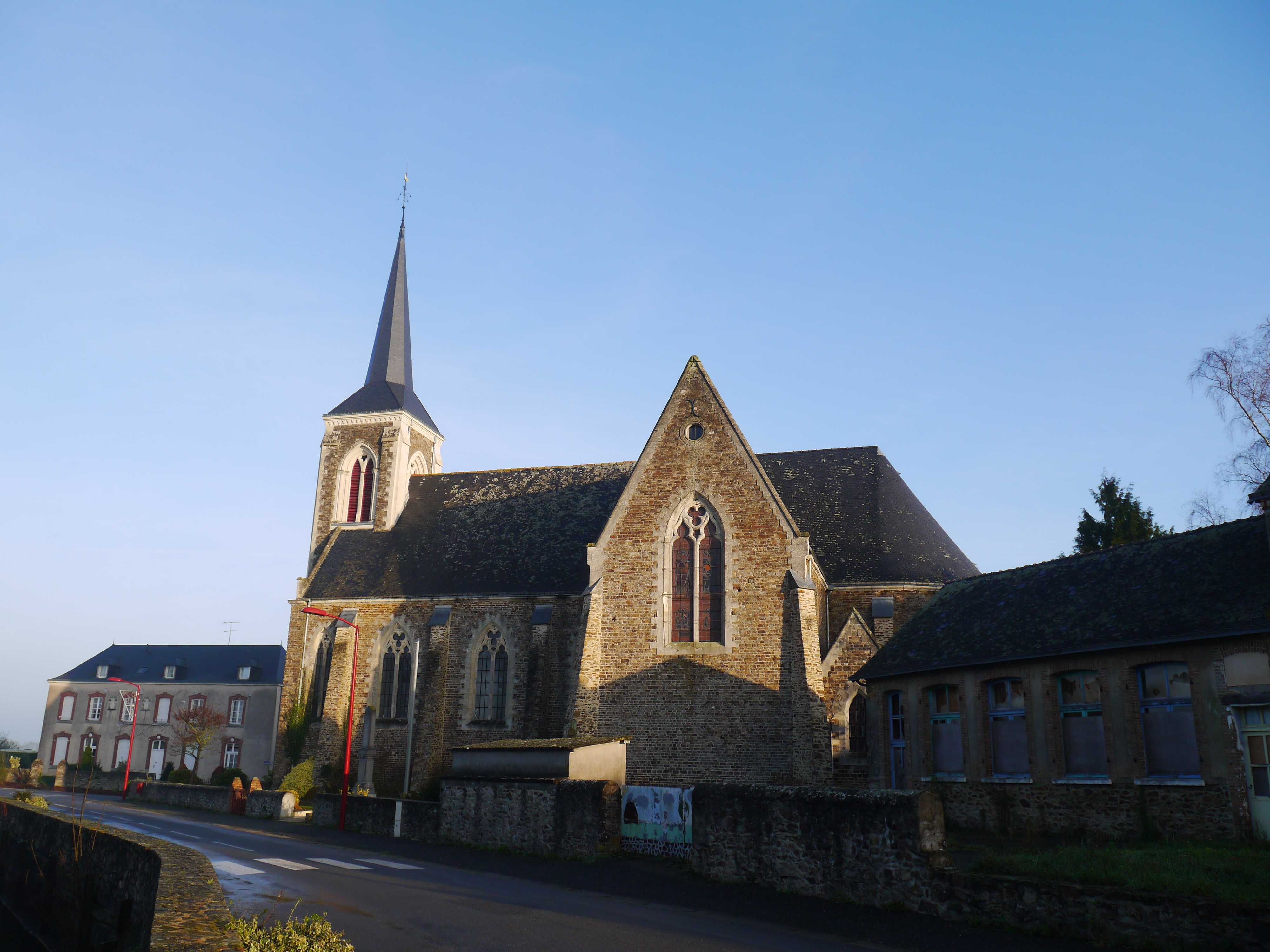 L'église Saint-Sulpice.